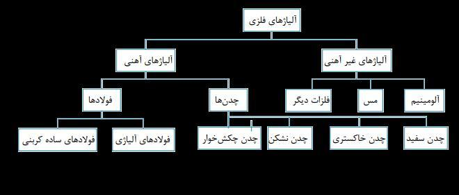 فلزات و آلیاژهای آنها